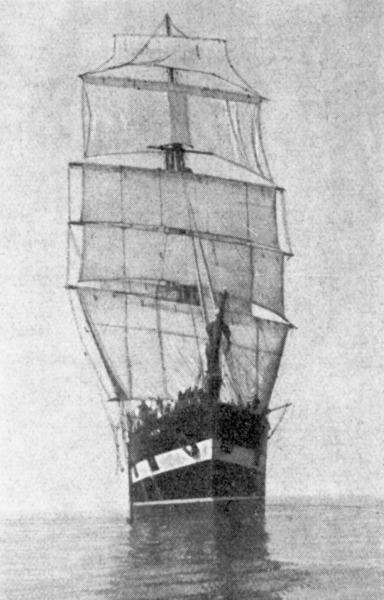 STS Lwów pod żaglami